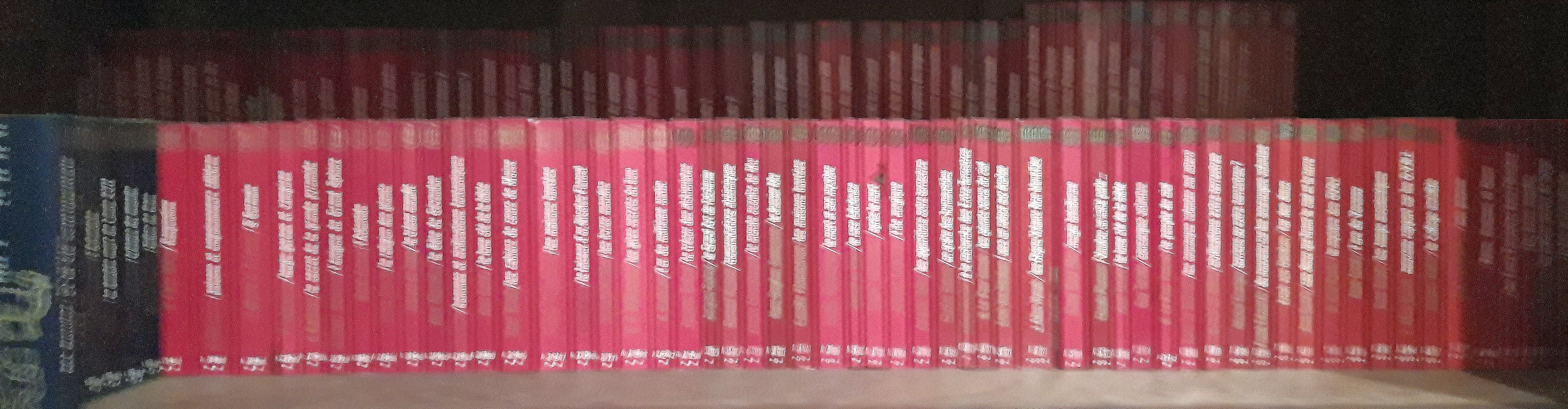 Collection 'Aventure Mystérieuse'.